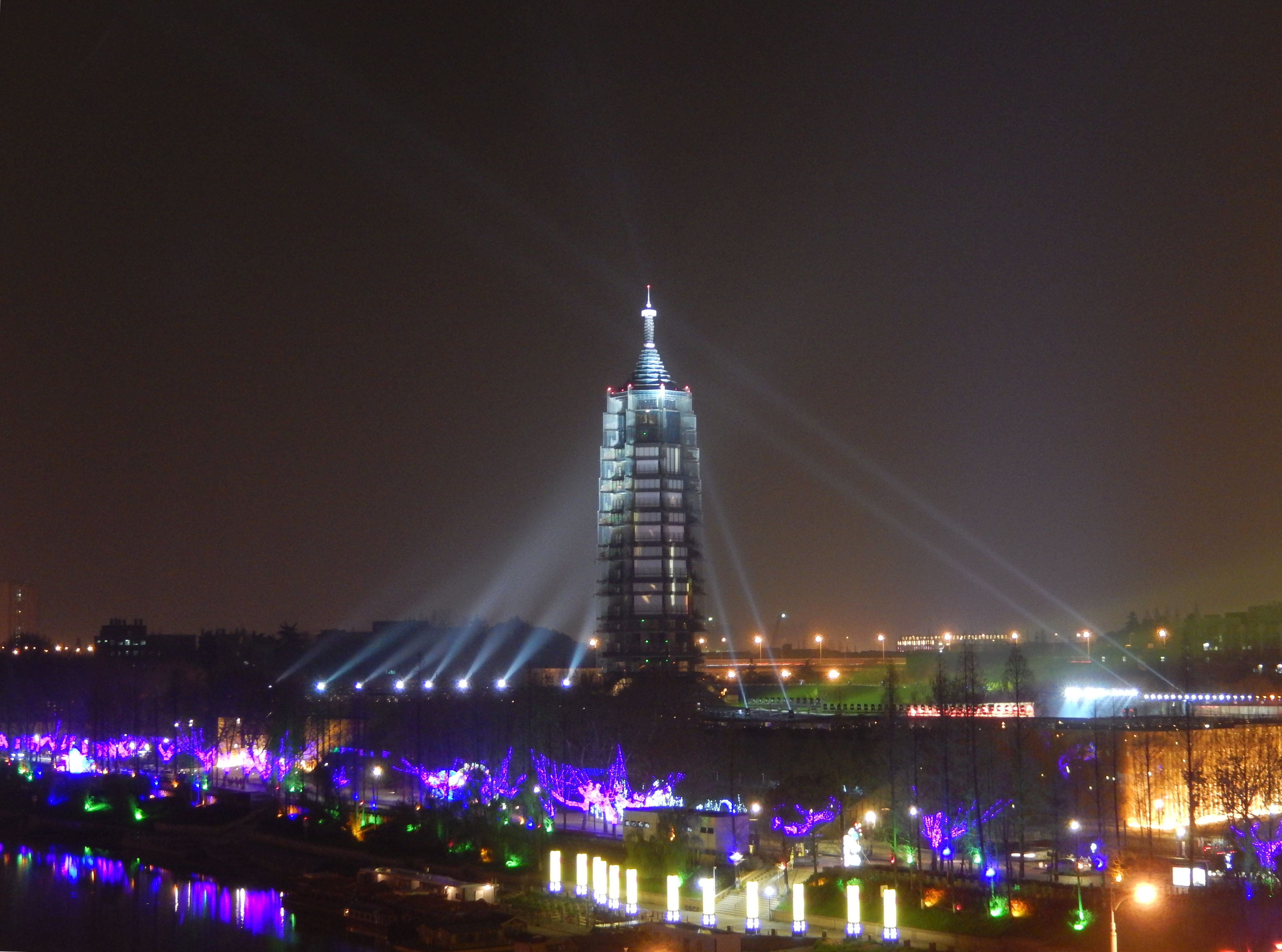 中文（中国大陆）: 南京大报恩寺夜景